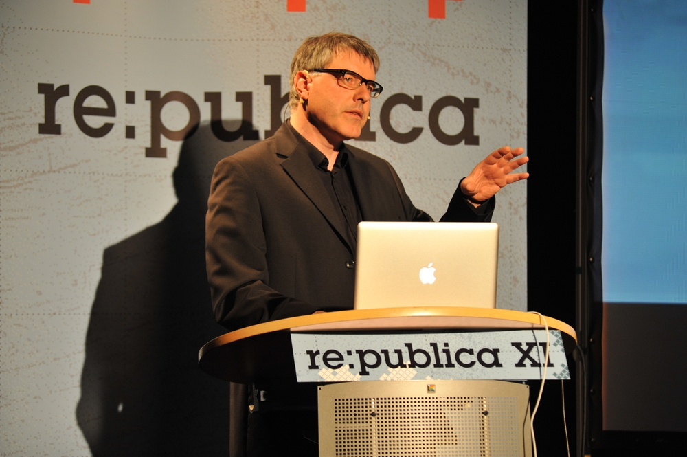 Corporate Journalism Neue Wege der digitalen Unternehmenskommunikation * (cc) dirk haeger / re:publica 2011